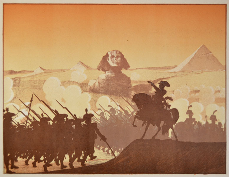 14e tableau du Sphinx (Le Sphinx, épopée lyrique en 16 tableaux, poème et musique de Georges Fragerolle, ombres et décors de Amédée Vignola, Paris, Enoch, 1896).